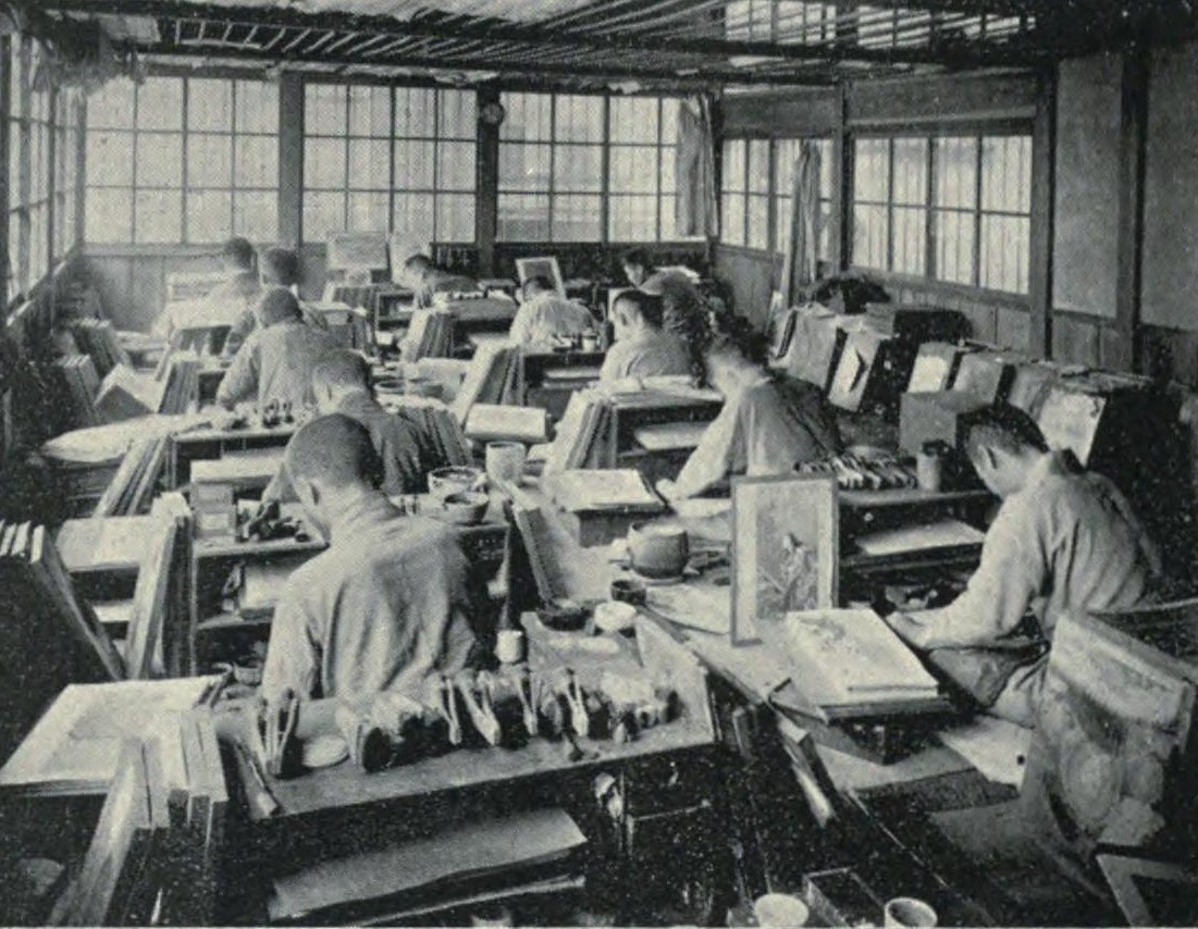 国華の木版画作業室